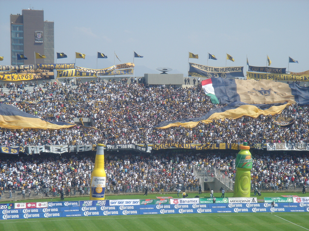 Afición Puma en CU